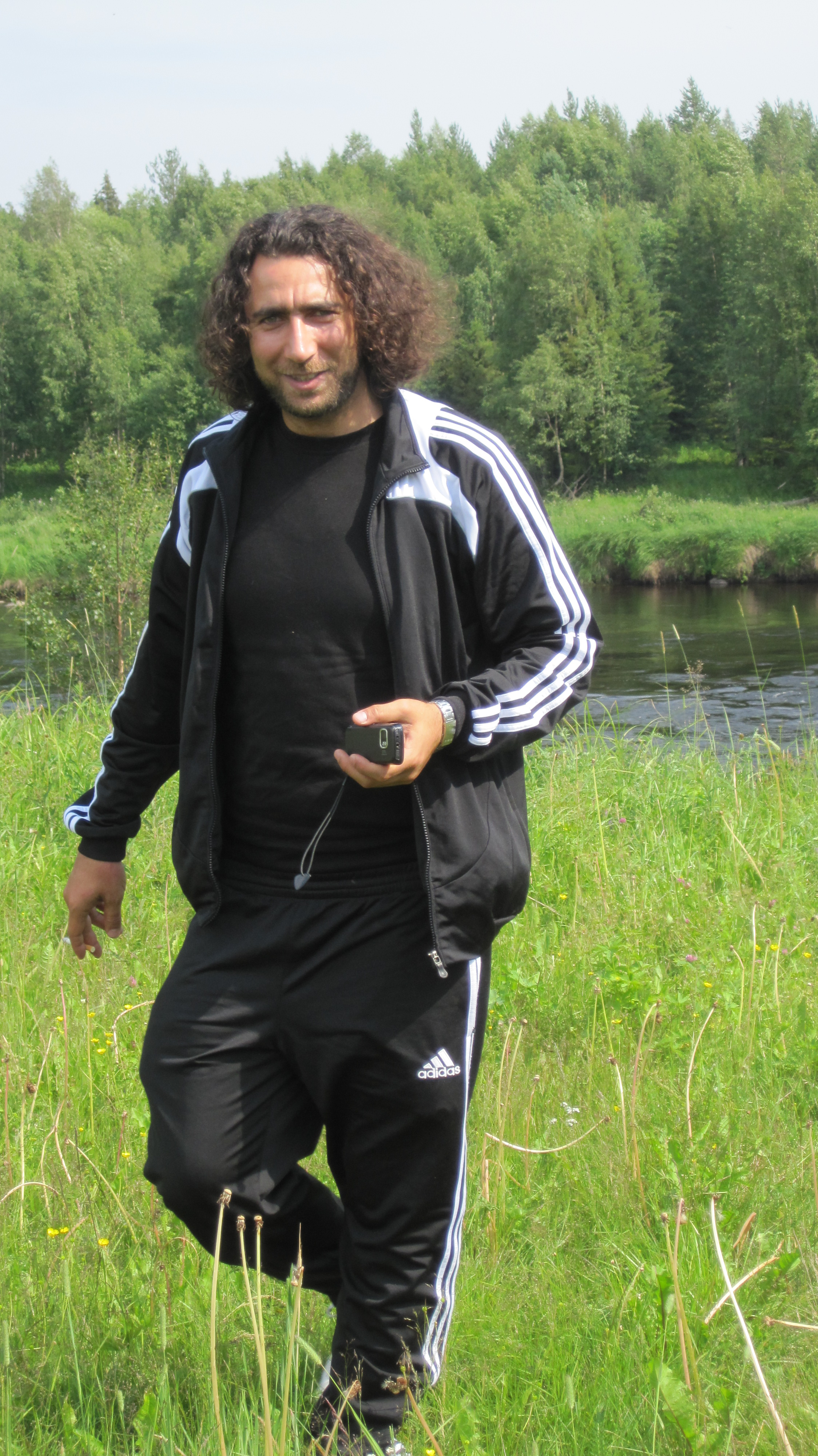 Ghayath Almadhoun fiskar i Ängesån i höjd med Överkalix.